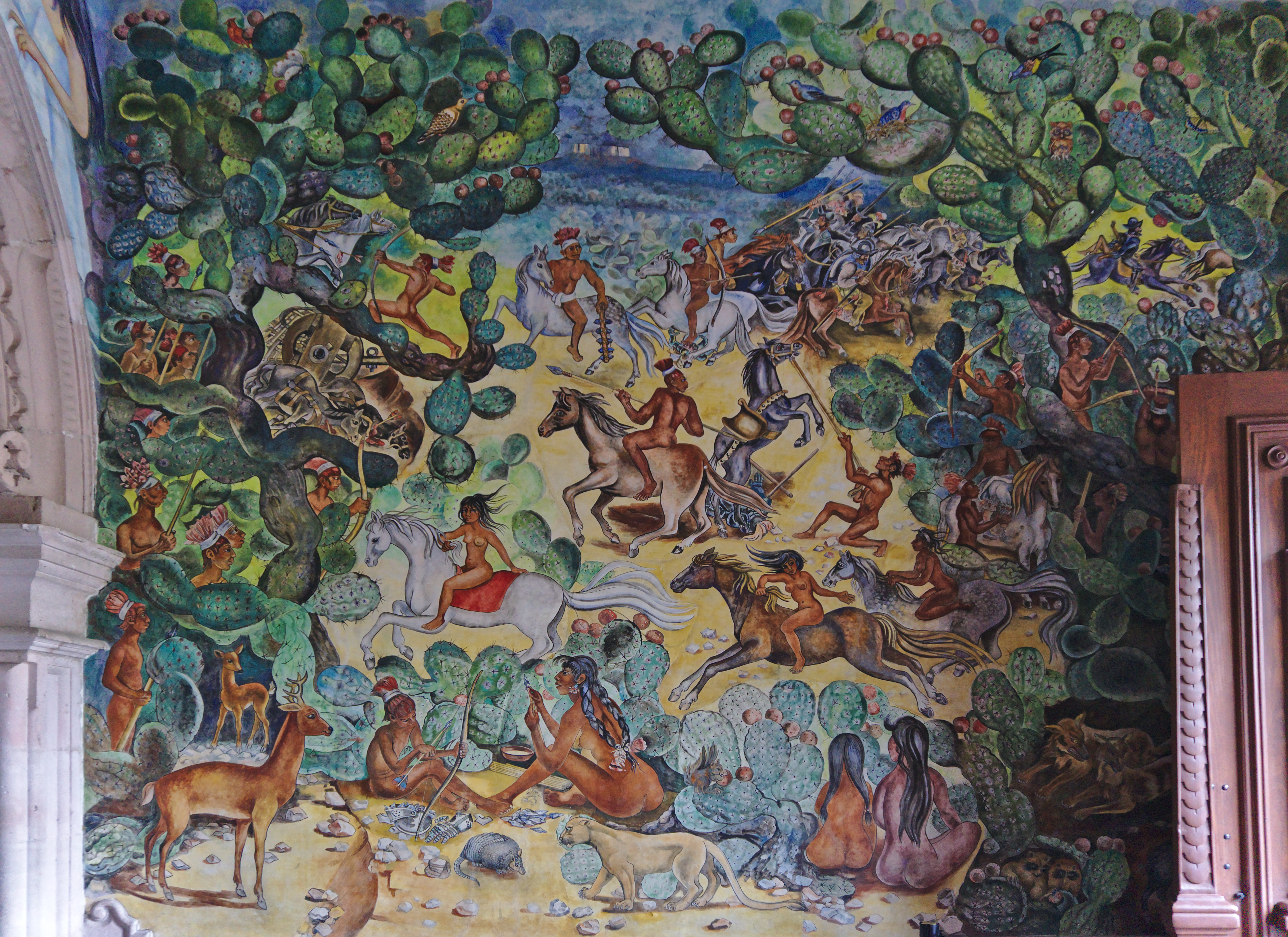 Mural del lado interior derecho de la entrada principal del Palacio de Gobierno, Aguascalientes, Ags., México